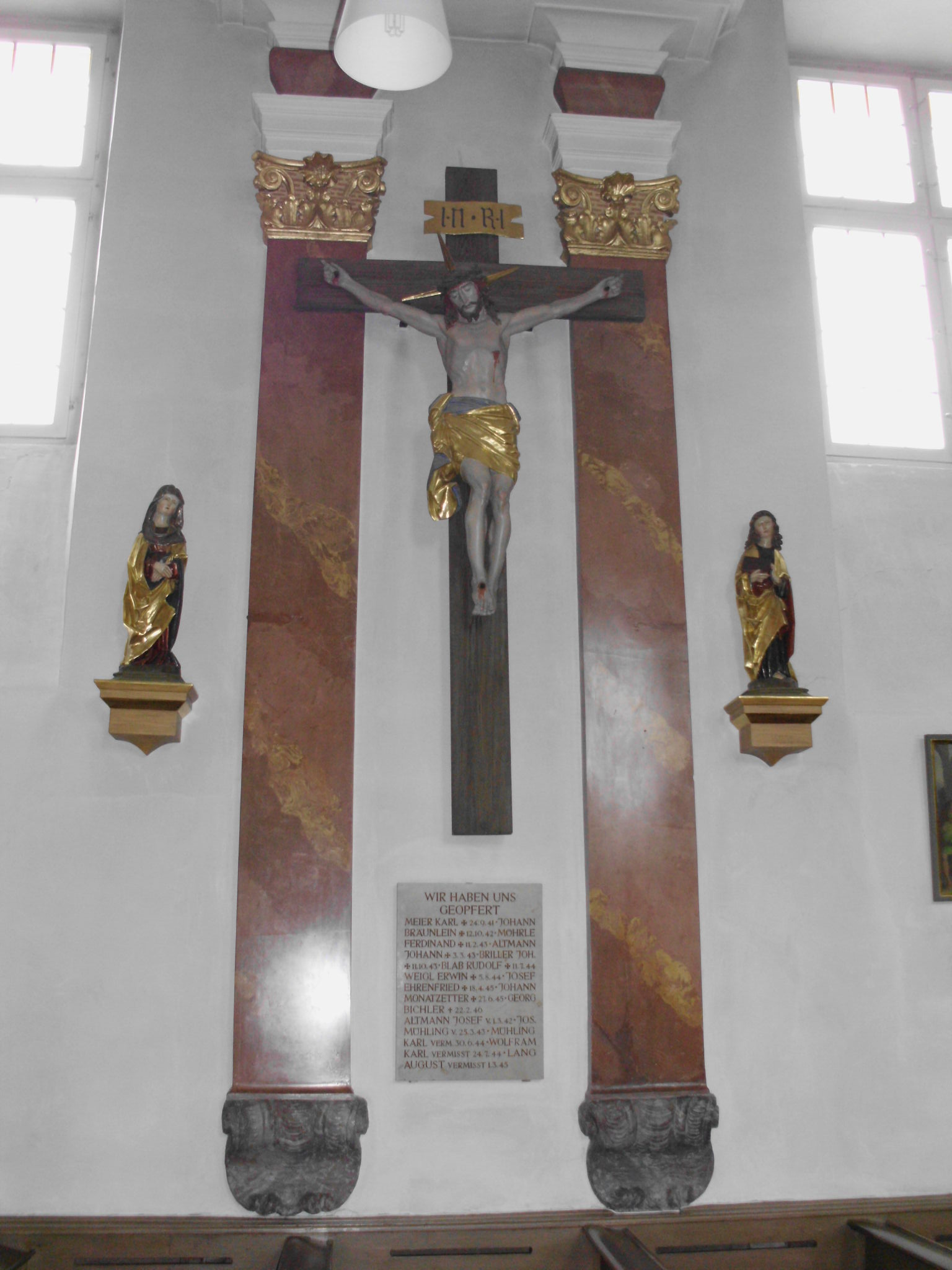 Absberg, Landkreis Weißenburg-Gunzenhausen (Bayern), Ehemaliges Deutschordensschloss, Schlosskapelle (heute Kath. Pfarrkirche St. Ottilia), Kreuzigungsgruppe an der Südwand